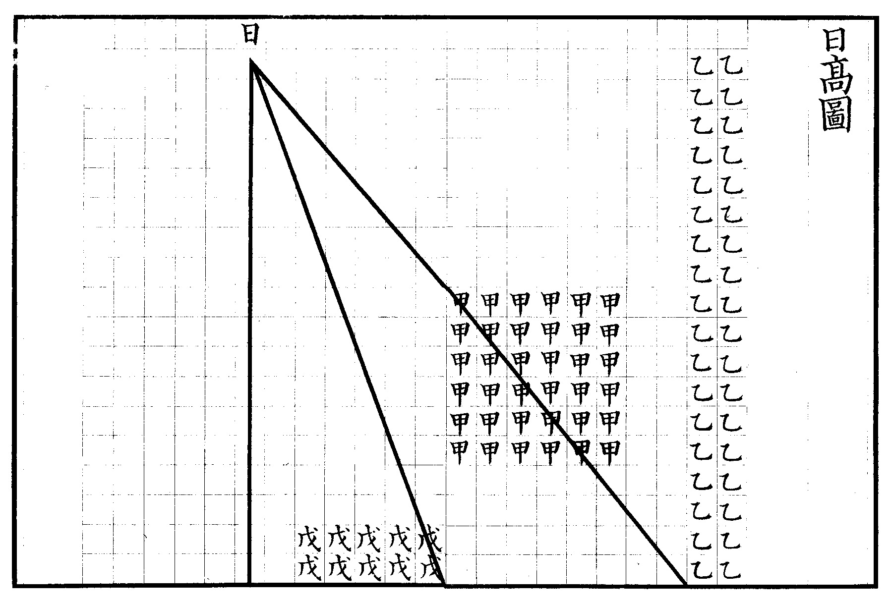 周髀算經之日高圖